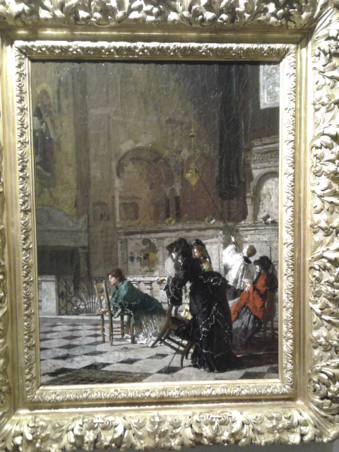 Nel Duomo di Monza, Mosè Bianchi (1872), Musei Civici di Monza